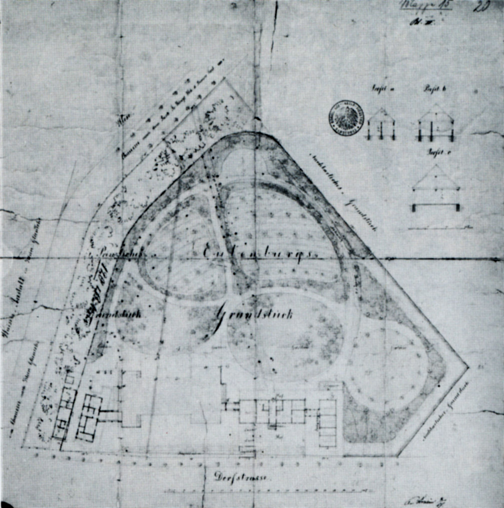 Klein-Glienicke, Lageplan des neu erbauten Waisenhauses, Ferdinand von Arnim 1857